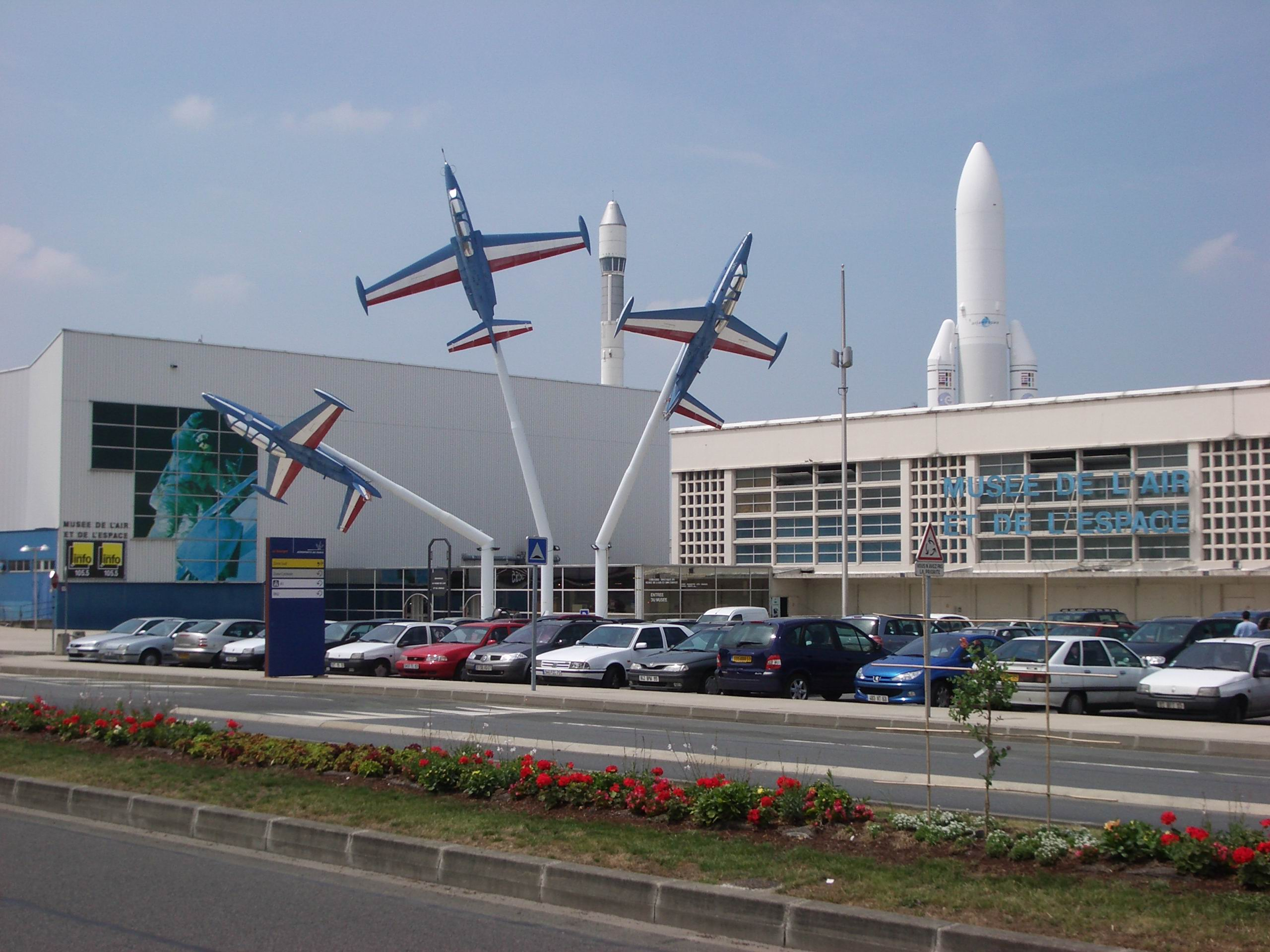 Ilmailumuseon julkisivu Le Bourgetissa, lähellä Pariisia, kesällä 2006.